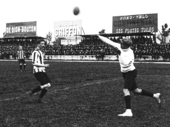 Parc des Princes, 1er mai 1910, US Tourcoing contre SH Marseille, finale du championnat de France de football USFSA.